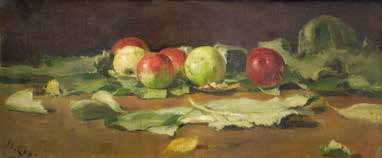 Яблоки на листьях. 1879 Холст на картоне, масло. 23,6x52. Слева внизу подпись: В. Съровъ 1879 Историко-художественный и литературный музей-заповедник «Абрамцево», Московская область